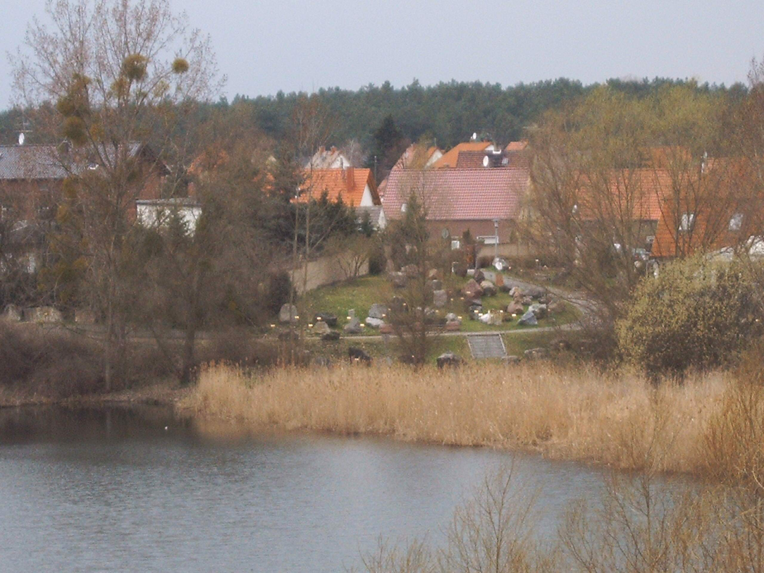 Gesteinsgarten Gommern, Deutschland Bild aufgenommen am 16.4.2006 von Olaf Meister